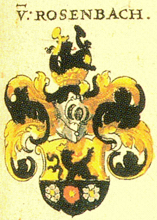 Wappen der Hessischen Adelsfamilie Rosenbach